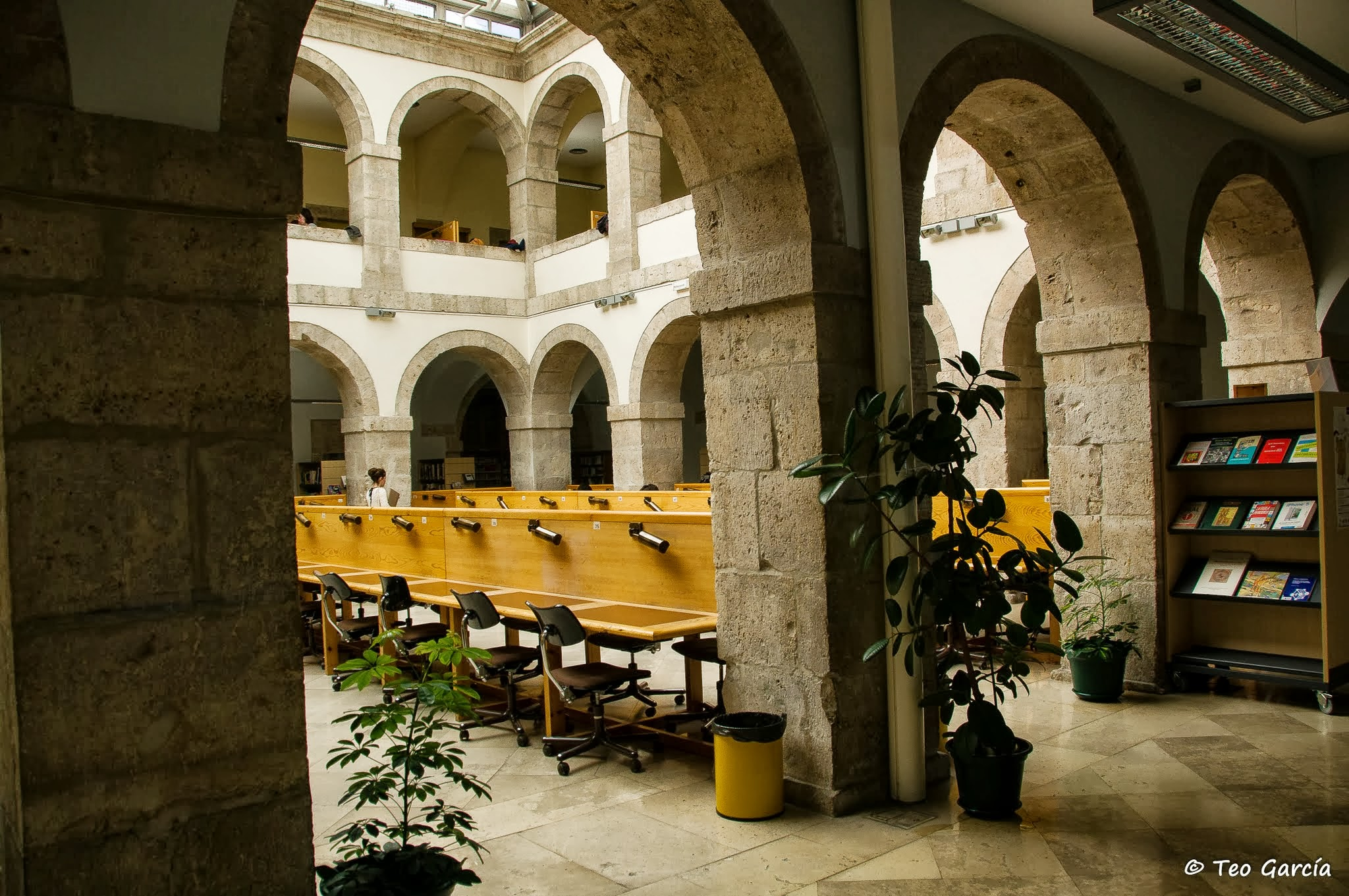 Esta imagen muestra el interior de la Biblioteca Reina Sofía, donde se pueden ver los diferentes puestos para los usuarios y las estanterías donde están disponibles artículos de Libre Acceso.